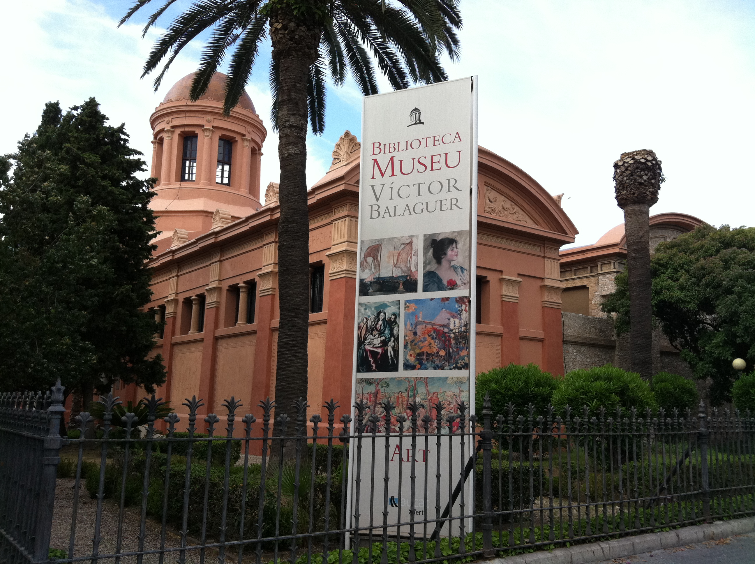 Biblioteca-Museu Víctor Balaguer